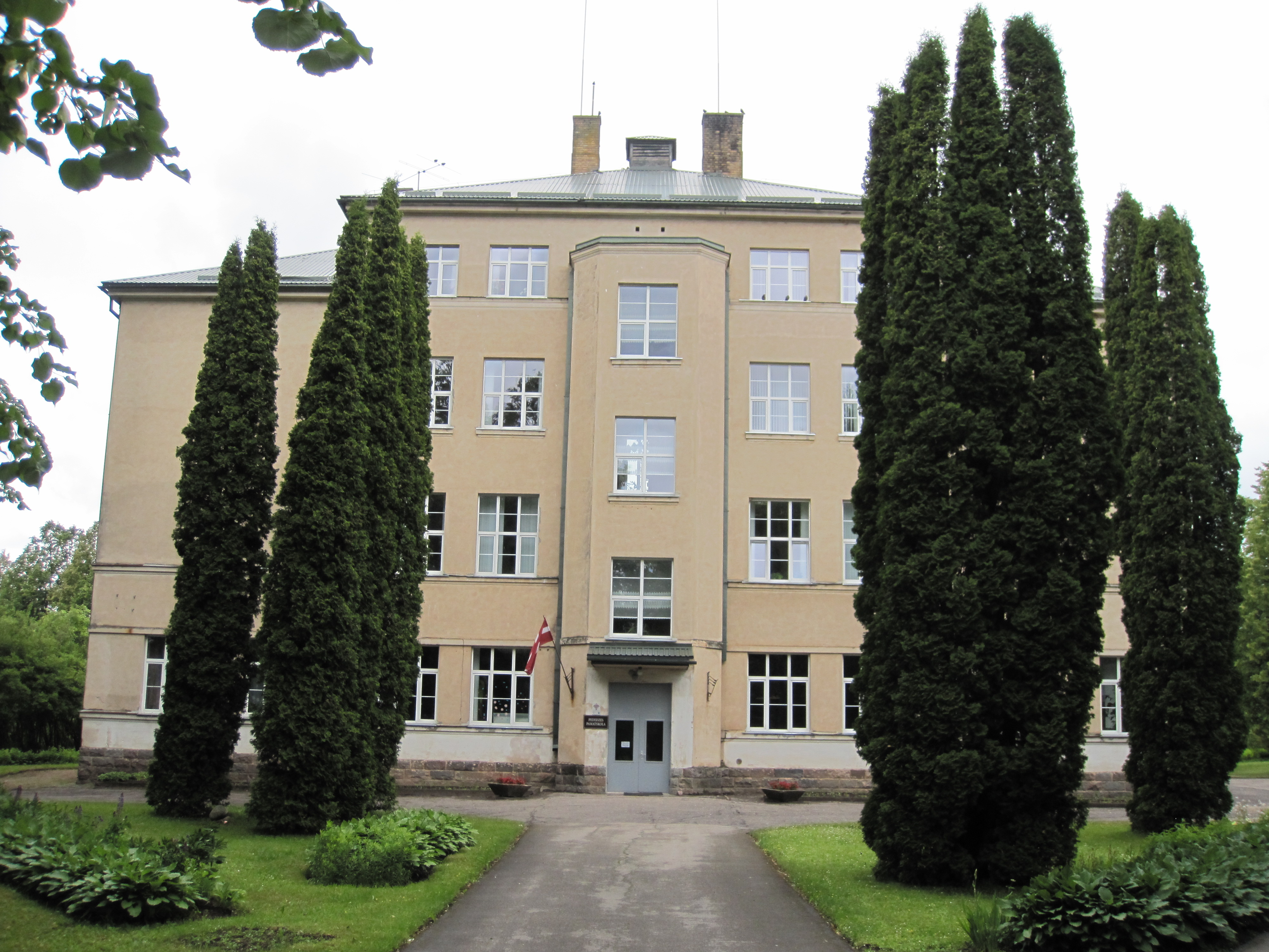 Pededzes pamatskola, 12.06.2016